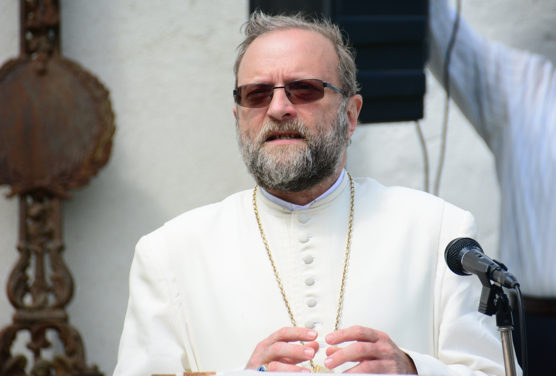 Michael Karl Prohazka, Abt des Prämonstratenser-Chorherrenstift Geras in Niederösterreich in Safov/Schaffa in Südmähren